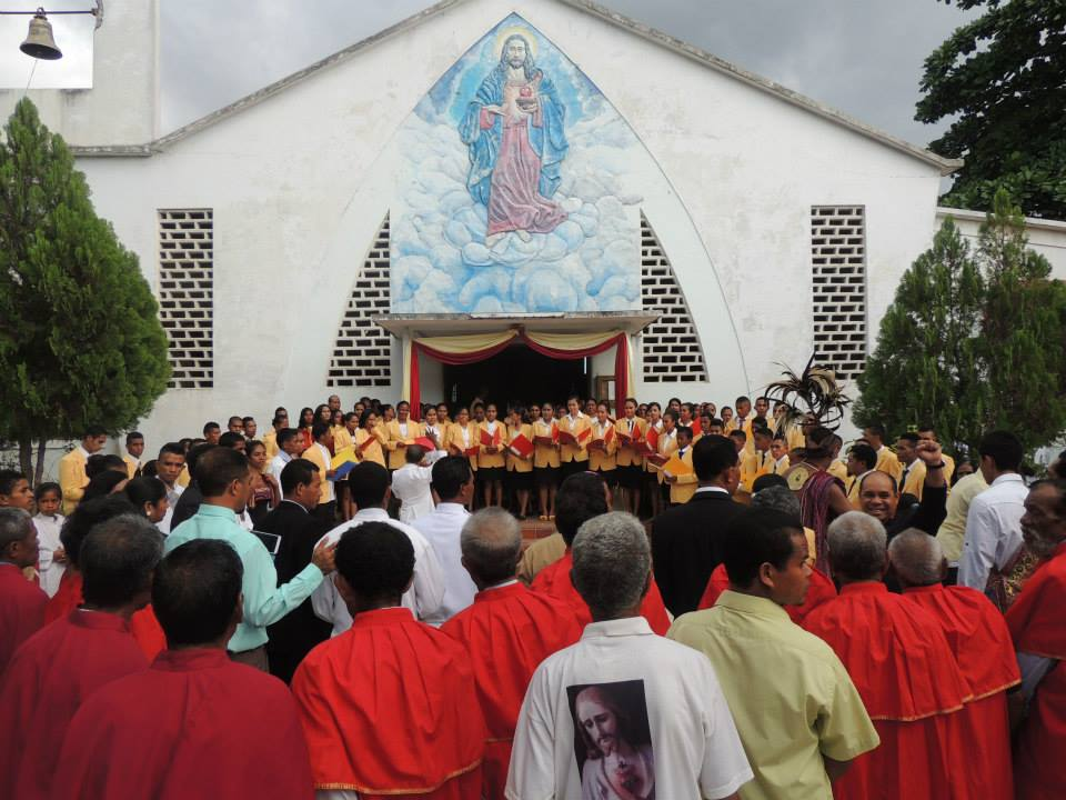 Herz-Jesu-Kirche, zum 50jährigen Jubiläum der Pfarrei Becora.